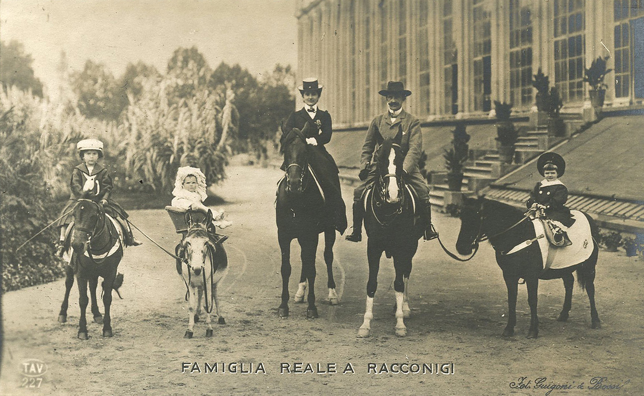 Король Виктор Эммануил III и Королева Елена Черногорская с их тремя старшими детьми Иоландой, Мафальде и Умберто II.1905.